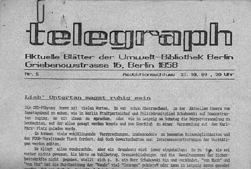 Telegraph, Blätter der Umweltbibliothek Berlin